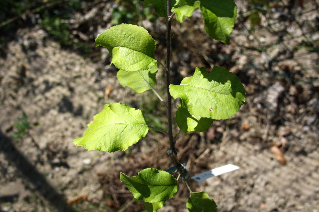 Pomme Rambour d'Hiver - Apple